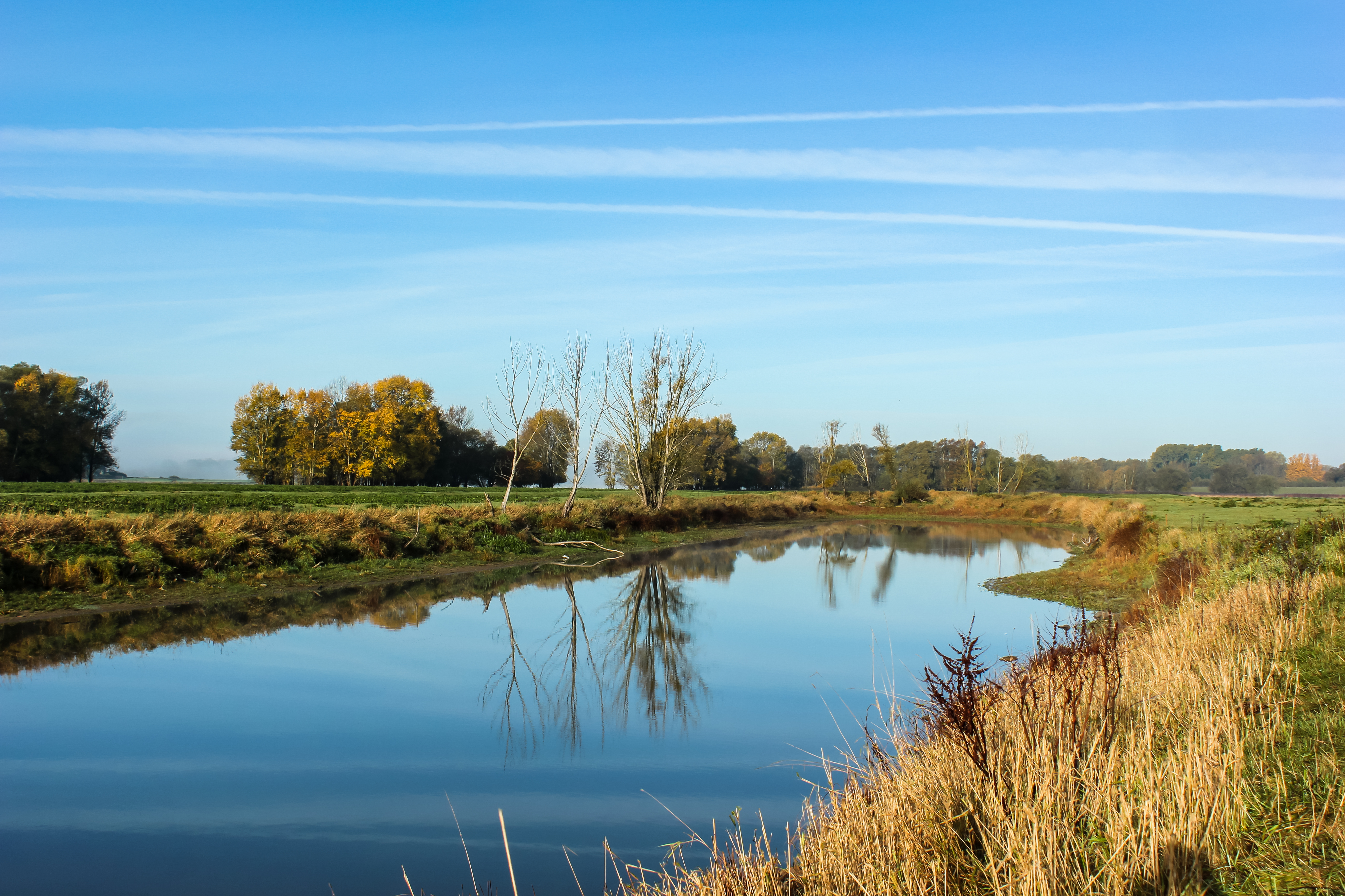 Altarm der Elbe im NSG „Werder Kietz“ in Lenzerwische, Biosphärenreservat Flusslandschaft Elbe und Landschaftsschutzgebiet Brandenburgische Elbtalaue zwischen Kietz und Klein Wootz.